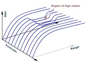 Schar von Kurven einer dynamischen STC- Verstärkungsregelung in einem Radarempfänger. Jede einzelne Kurve wirkt in einer ganz bestimmten Auslenkung (Impulsperiode).